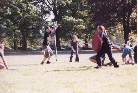 A jugger game disputed by Hannover Living Undeads